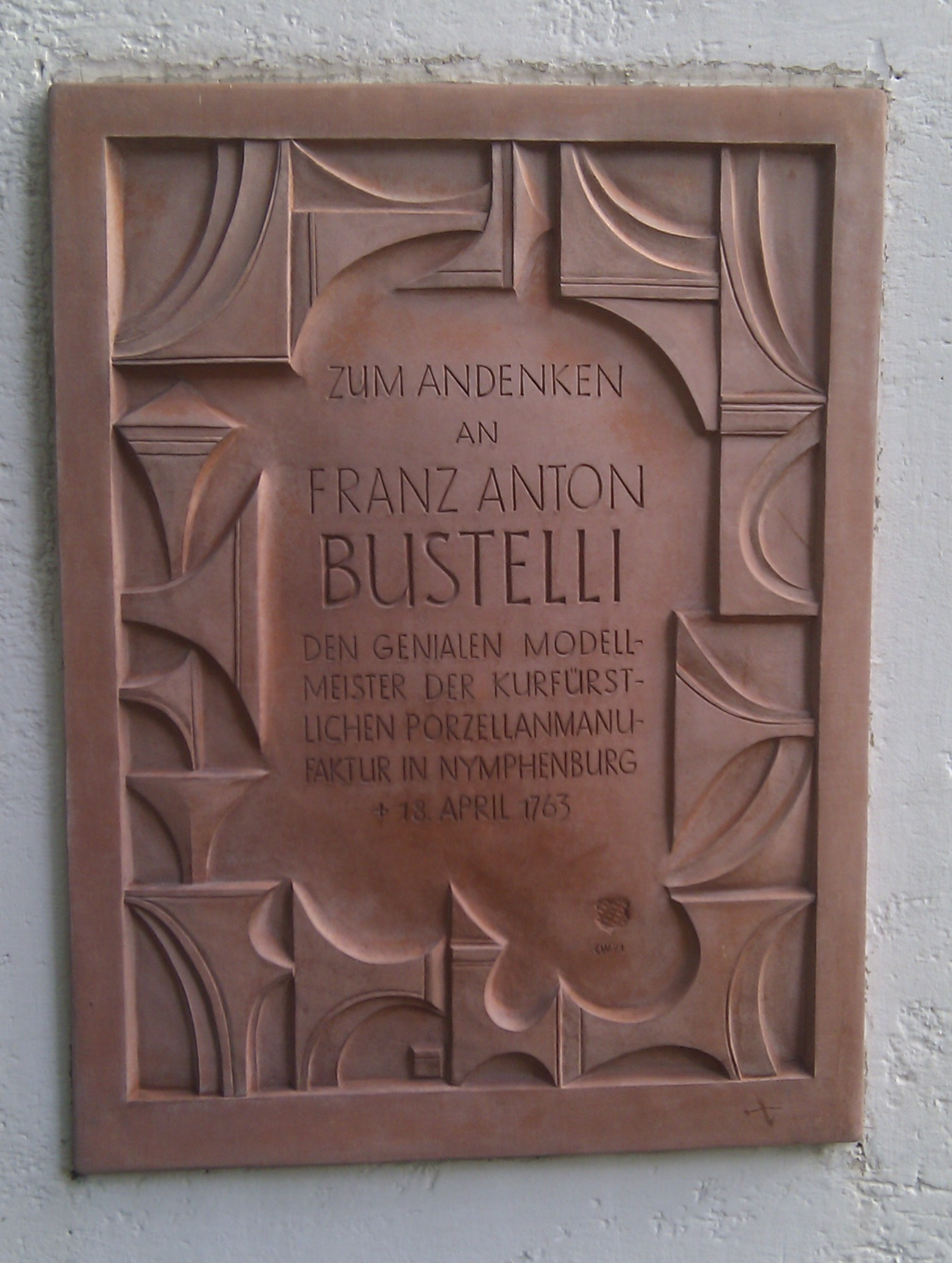 Gedenktafel an Franz Anton Bustelli an der Winthirkirche, München: "Zum Andenken an Franz Anton Bustelli, den genialen Meister der Kurfürstlichen Porzellanmanufaktur Nymphenburg † 18. April 1763"